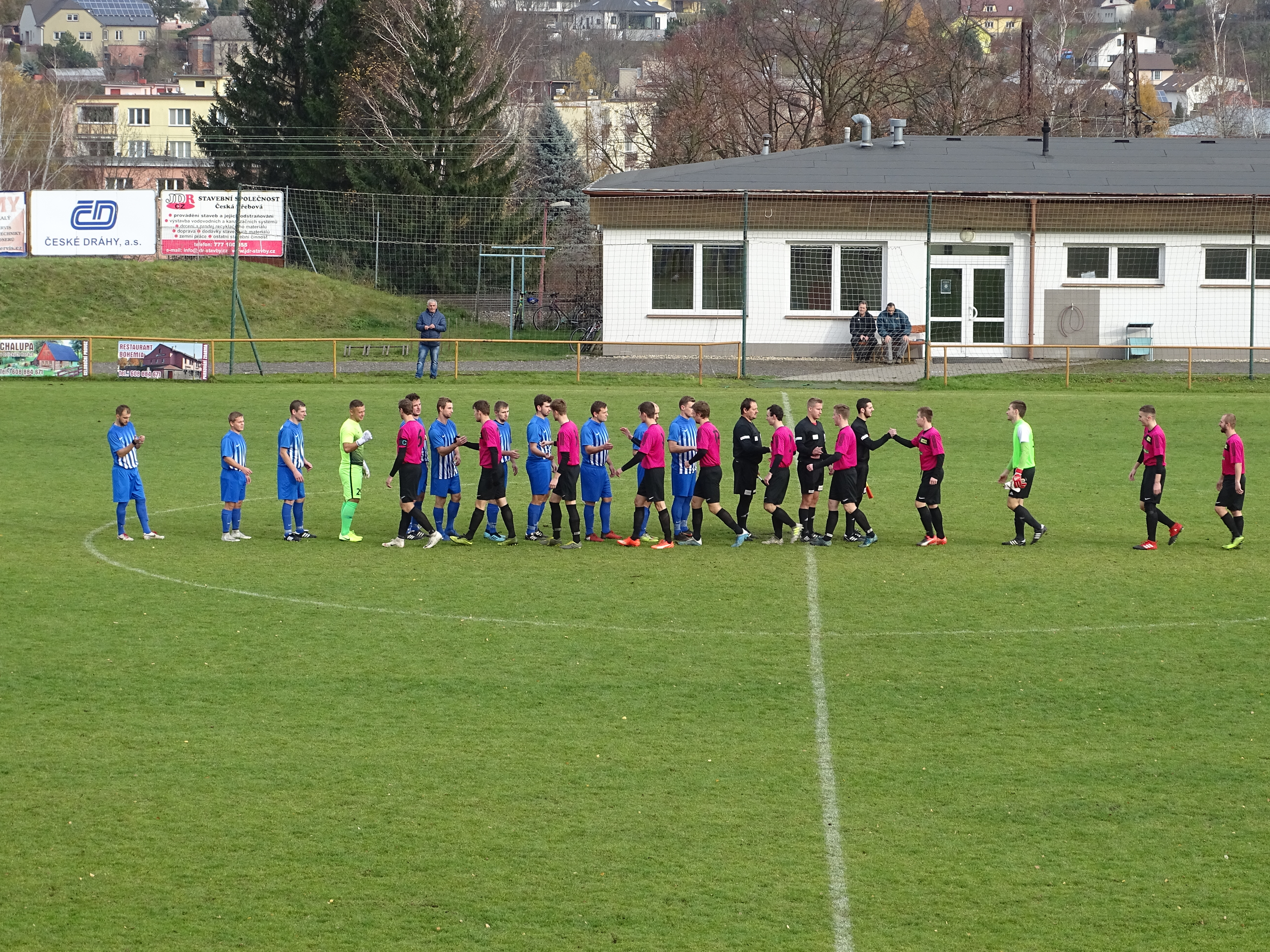 hráči FK Česká Třebové a Lanškrouna v úvodu zápasu